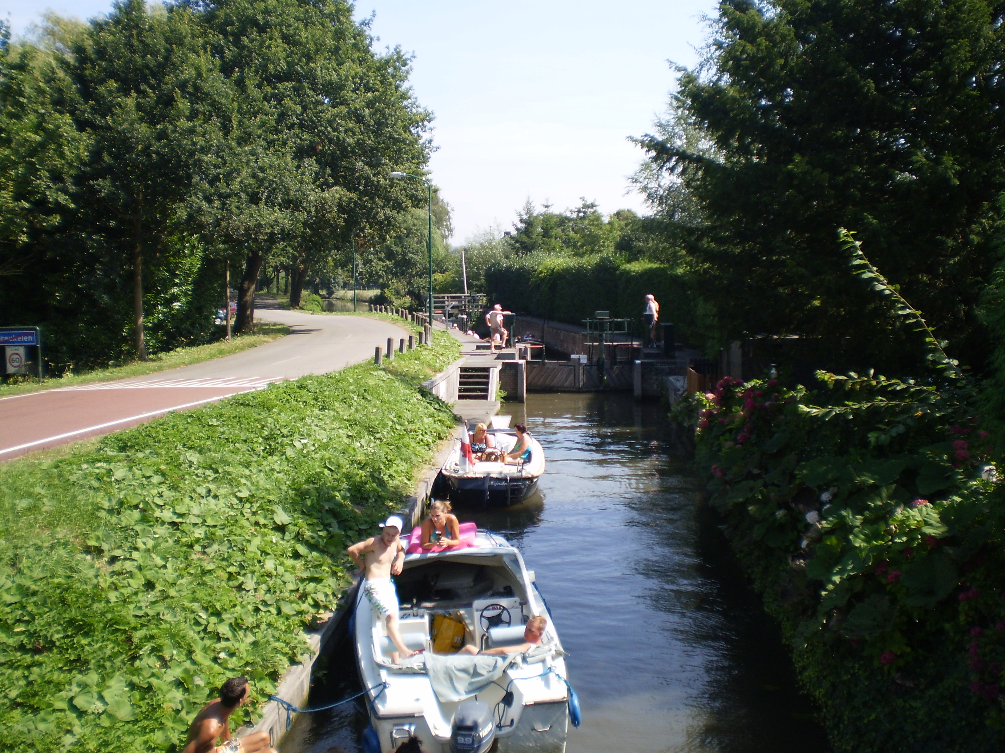 Kraaienestersluis in de Nederlandse gemeente Stichtse Vecht. De sluis vormt een verbinding tussen de rivier de Vecht en het Tienhovens Kanaal met Loosdrechtse Plassen. Mogelijk is de sluis in de 17e eeuw aangelegd. Gaandeweg de geschiedenis is de sluis aangepast. De sluis maakte deel uit in de Nieuwe Hollandse Waterlinie van een complex van werken in relatie met het nabijgelegen Fort bij Tienhoven. Vandaag de dag werkt de sluis op basis van zelfbediening voor kleine vaartuigen met beperkte hoogte. De Kraaienestersluis is in monumentaal opzicht voorbeschermd.